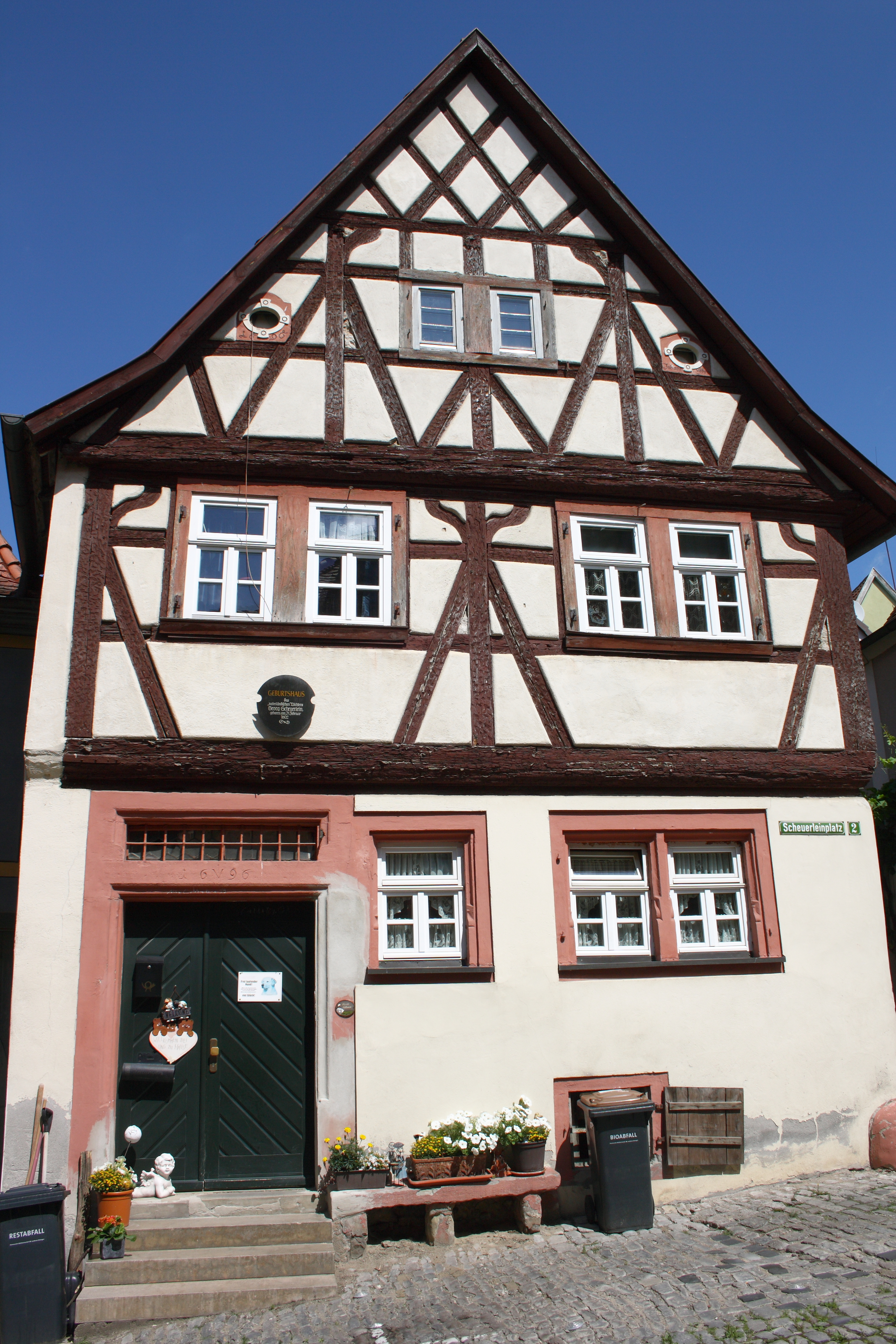 Haus Scheuerleinplatz 2 in Mainbernheim im Landkreis Kitzingen (Bayern)